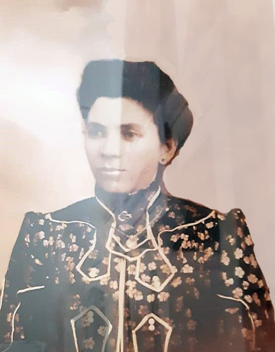 Maria Giuseppa Arato, madre di Joe Petrosino (Giuseppe), moglie di Prospero Petrosino.